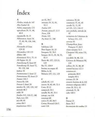 Llibres